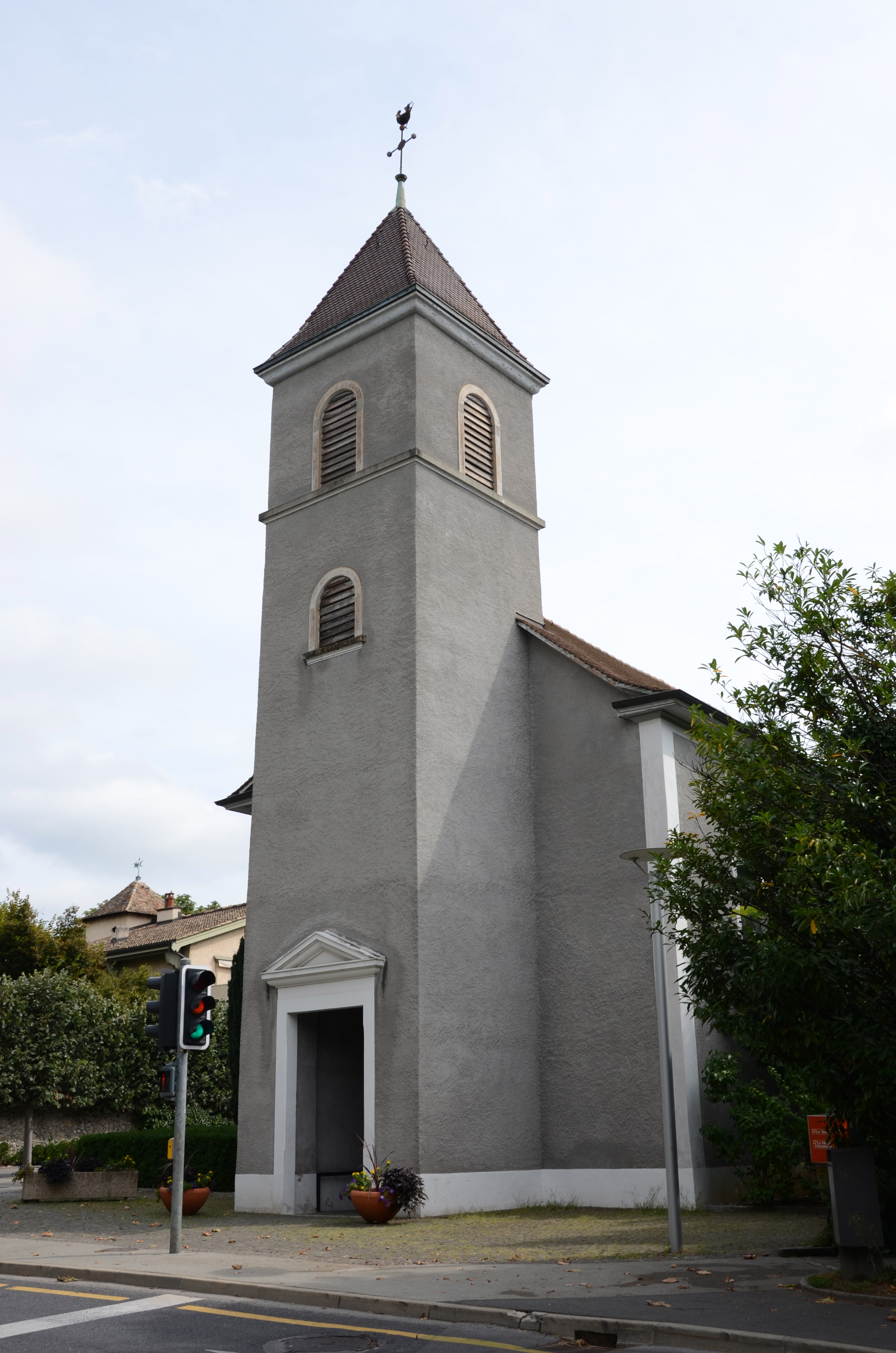 Eglise Saint-Pierre, Thônex, Canton de Genève